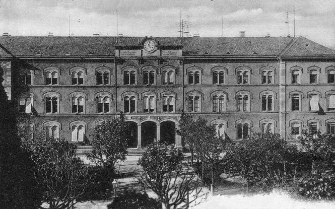 Historisch Ansicht des Gebäudes des Bertholdgymnasiums in der Bertoldstraße gebaut 1866 zerstört 1944, nicht wieder aufgebaut